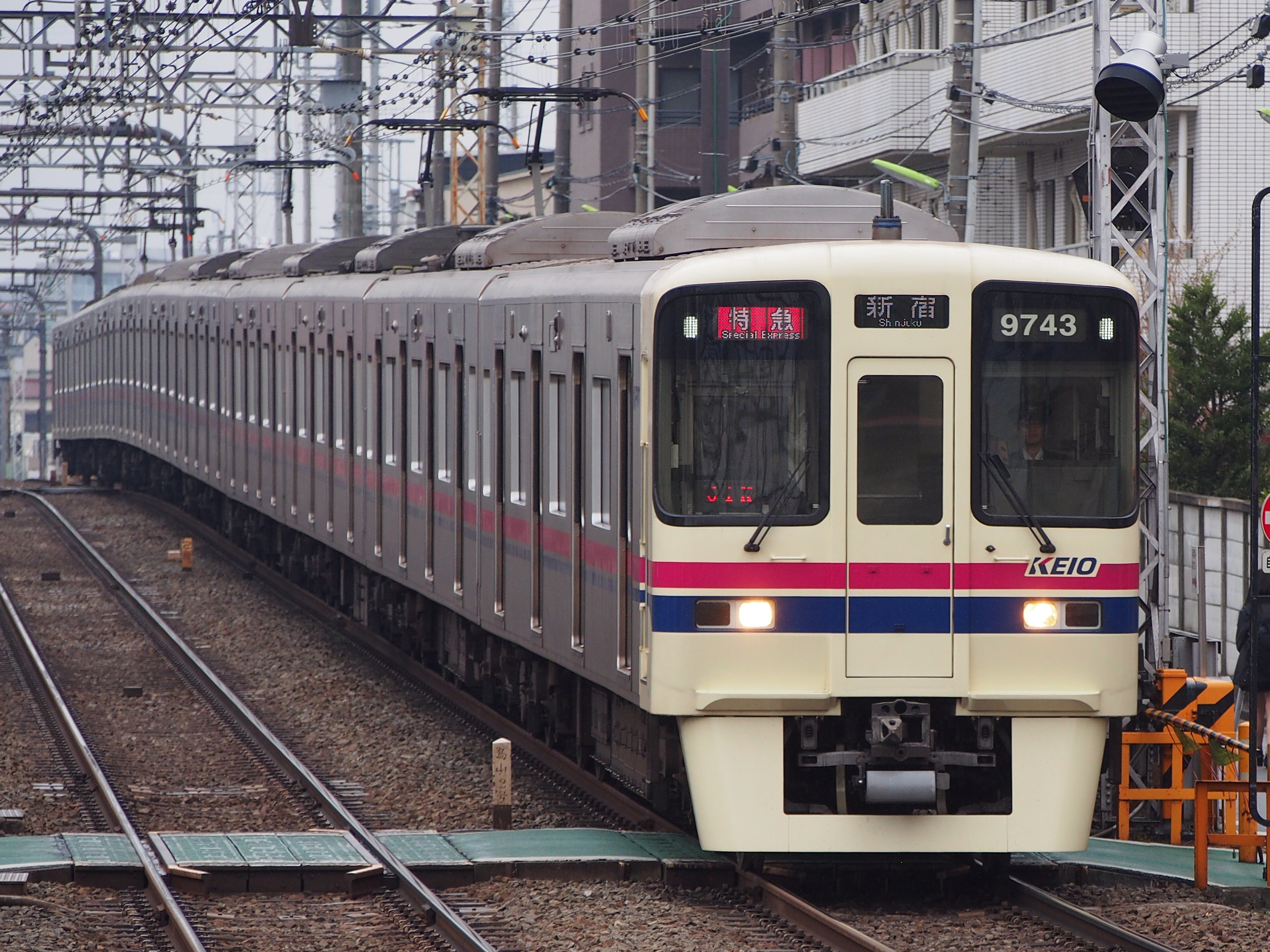 地下鉄線直通対応の9000系9743Fによる特急新宿行き Olympus E-PL5